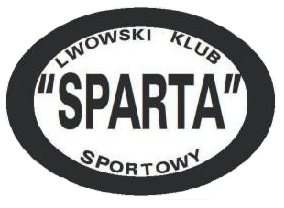 Logo von Sparta Lwow